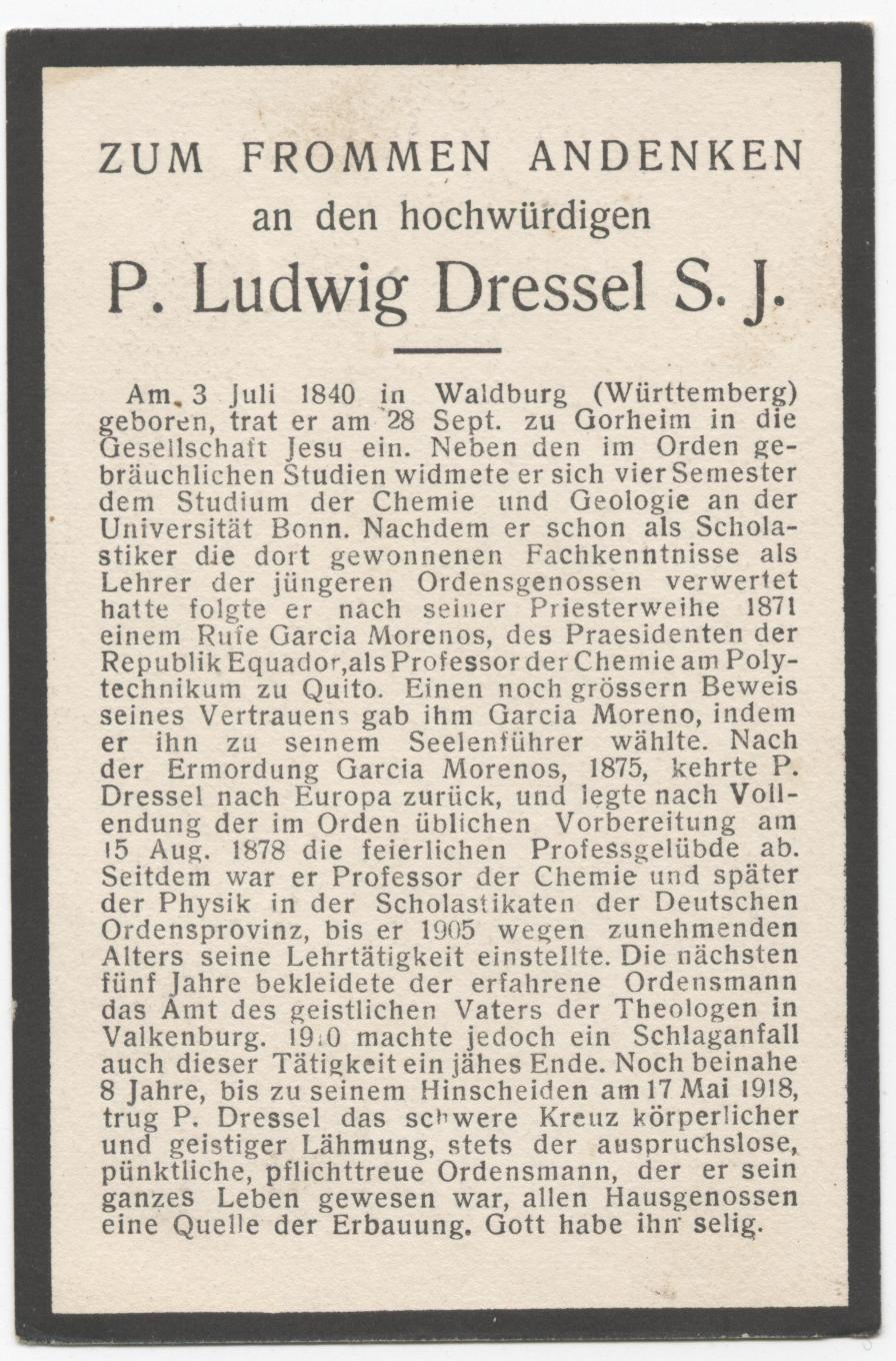 Pater Ludwig Dressel S.J. Totenzettel